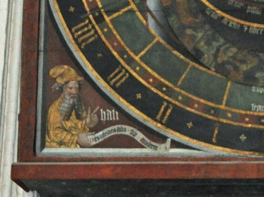 Der ägyptische Astrologe Hali (Ali ibn Ridwan) auf der Astronomischen Uhr in St. Nikolai (Stralsund).